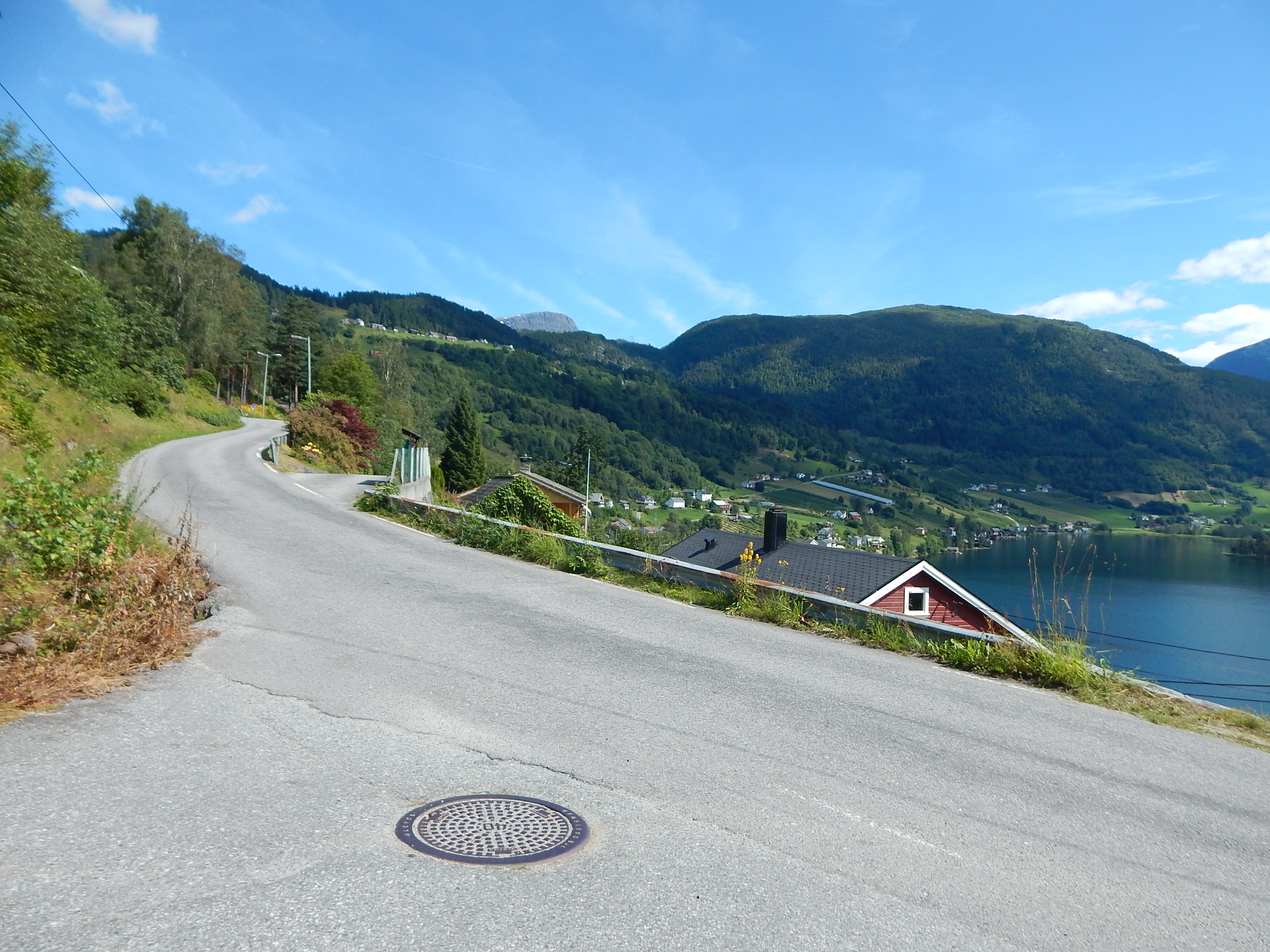 Øvragardsvegen (fylkesvei 303) forbi Rossvoll gravplass i Ulvik